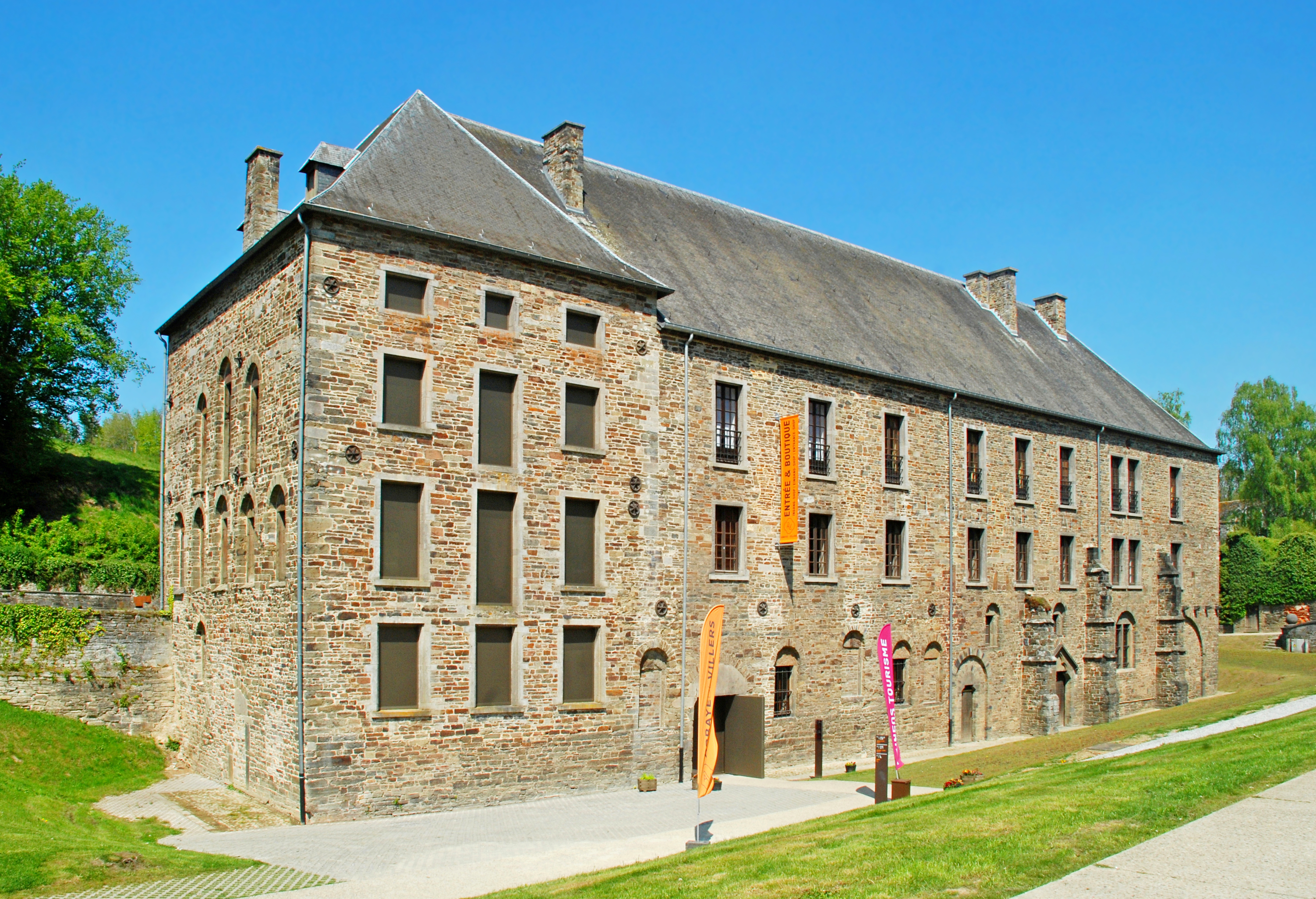 Belgique- Brabant wallon - Villers-la-Ville - ancien moulin abbatial This photo of immovable heritage has been taken in the Walloon Region